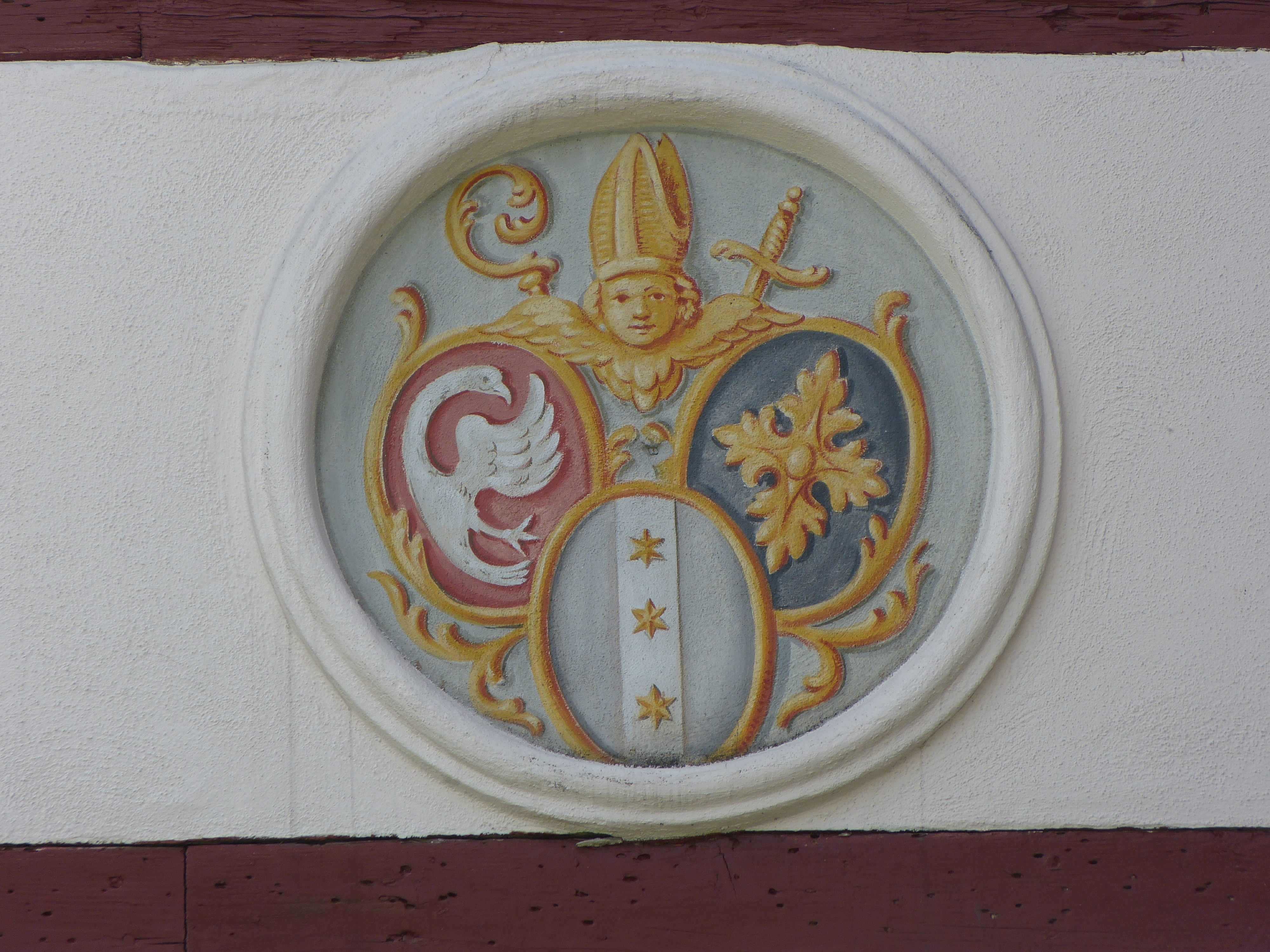 Pfarrhof in Wolfertschwenden, Landkreis Unterallgäu, Bayern